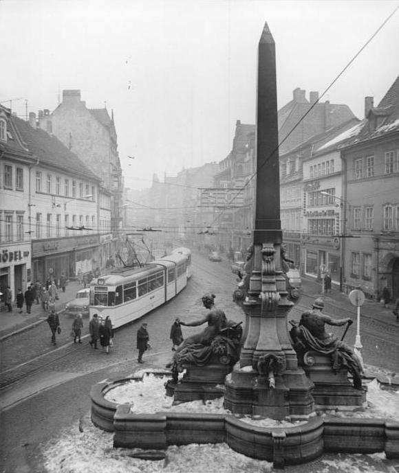 Erfurt, Anger, Angerbrunnen, Straßenbahn Zentralbild Demme 14.3.70 Erfurt: Blick an einem Wintertag auf den Anger mit dem Angerbrunnen in Erfurt. Auf Vorschlag der Regierung der DDR treffen am 19.3.70 in Erfurt der Vorsitzende des Ministerrates der DDR, Willi Steph, und der Bundeskanzler der Bundesrepublik, Willy Brandt, zusammen.